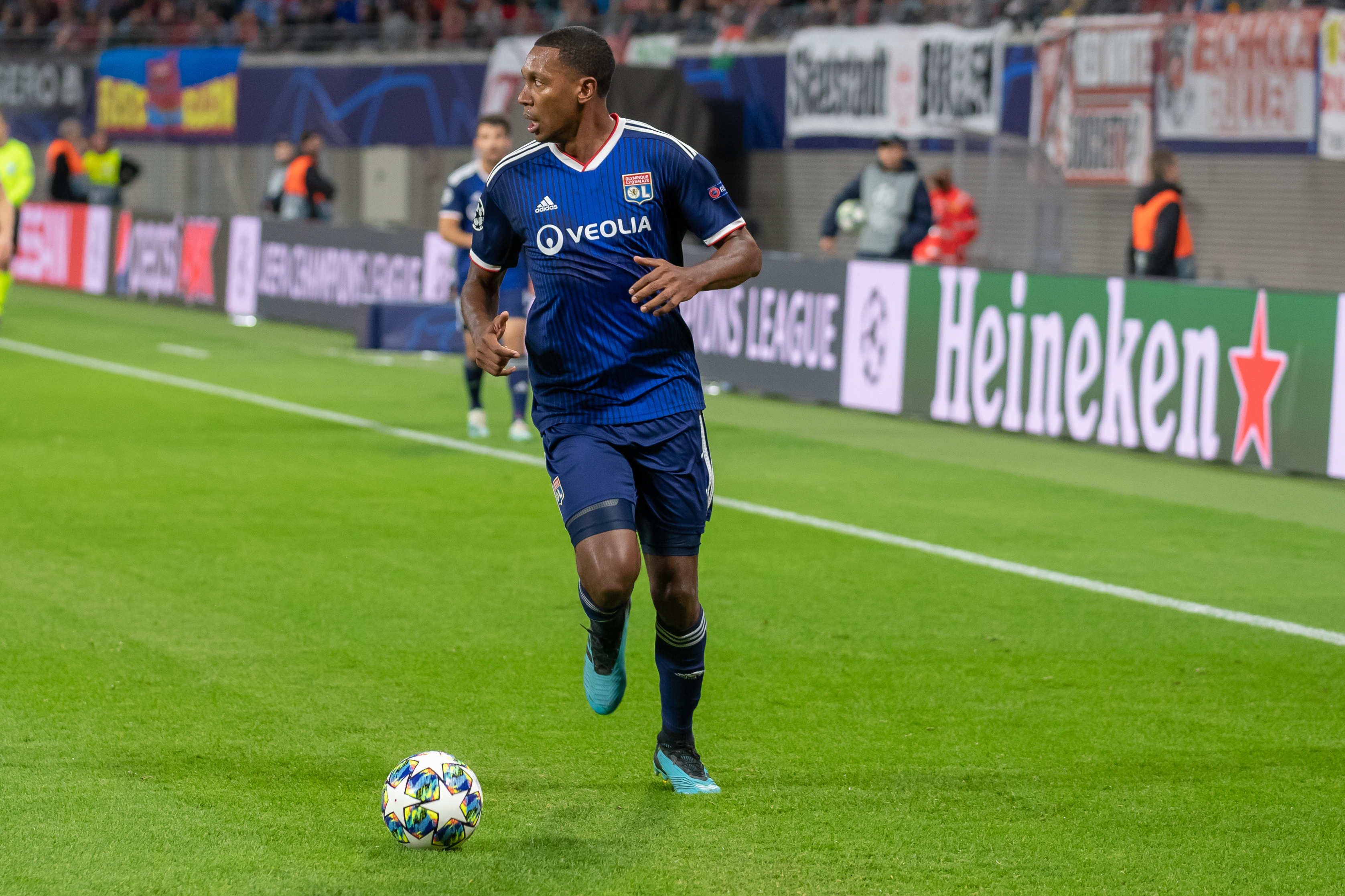 Fußball, Männer, UEFA Champions League, RB Leipzig - Olympique Lyonnais; Marcelo (Olympique Lyonnais, 6); Freisteller, Einzelbild, Aktion, action